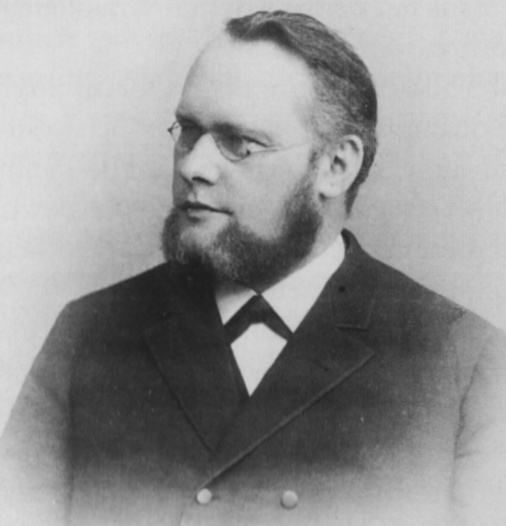 Hermann Faulhaber (1842–1914), Gründer des Evangelischen Diakoniewerks Schwäbisch Hall